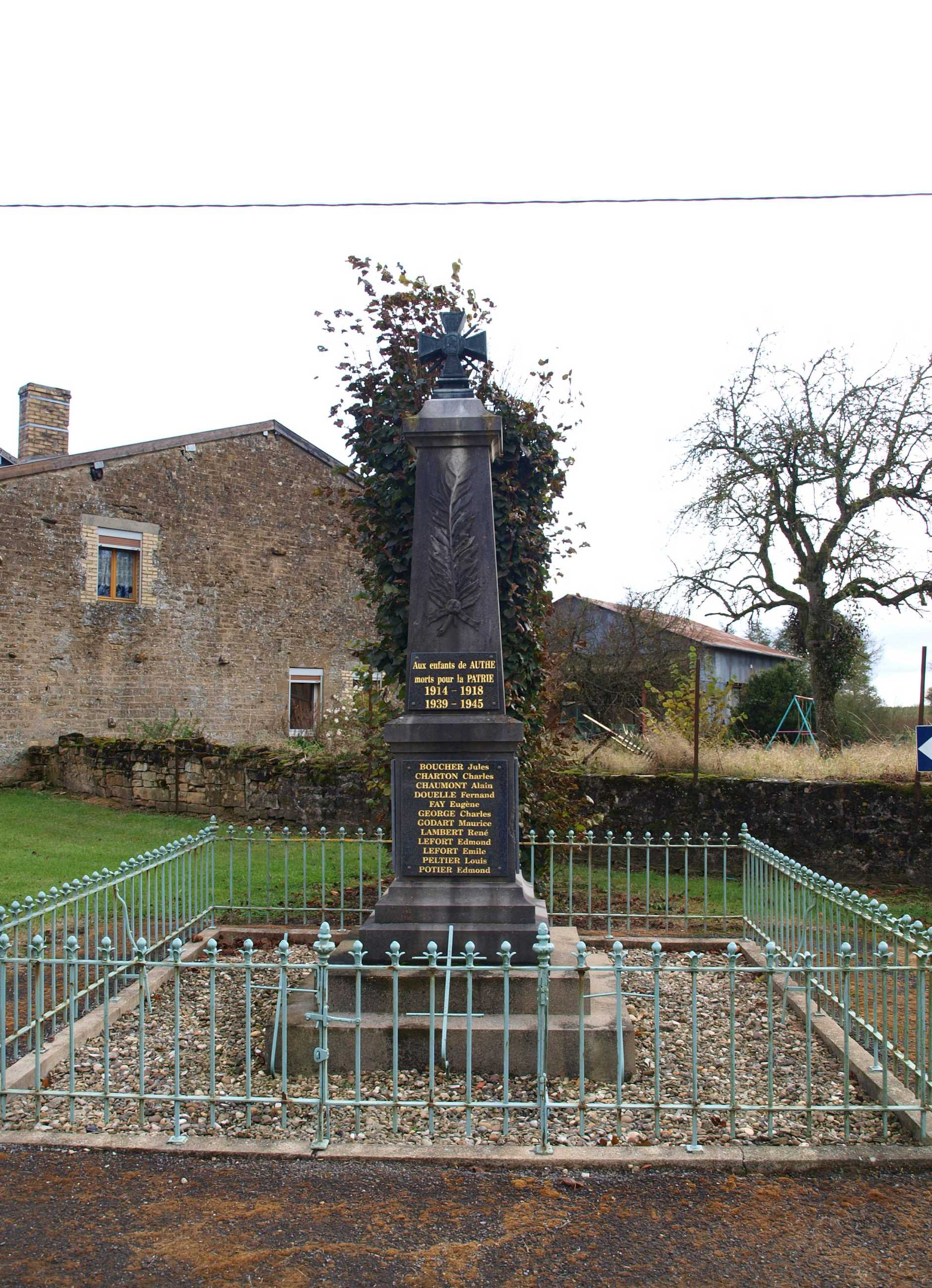 Authe (Ardennes, France) ; monument aux morts